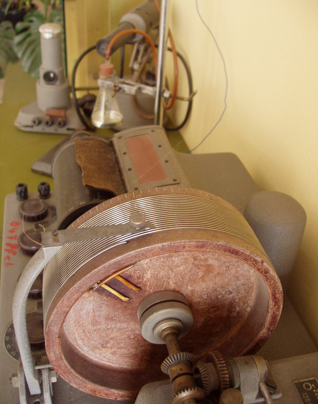 Česky: Heyrovského polarograf